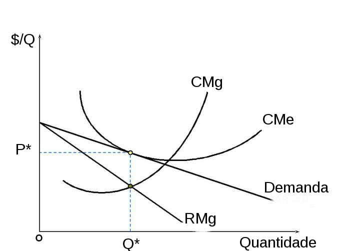 A imagem descreve o equilíbrio de uma empresa inserida na competição monopolística. No longo prazo, o lucro vai atrair novas empresas, deslocando a curva de demanda da empresa para baixo. A consequências são que a empresa perderá uma fatia de mercado e seus lucros serão reduzidos a zero.